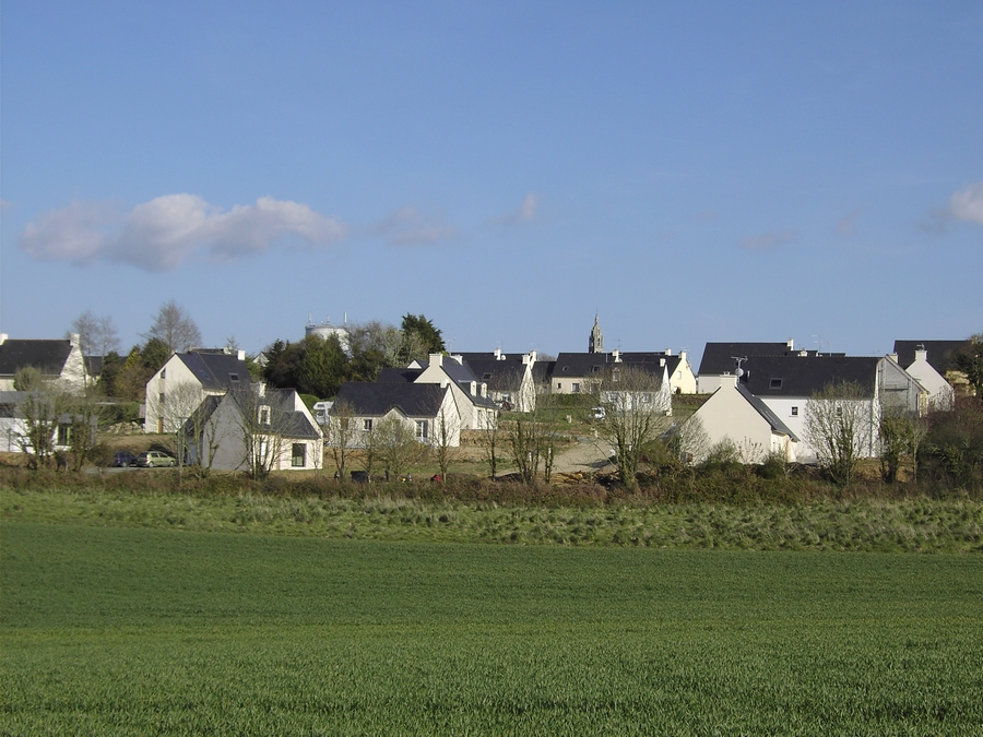 vue de ploneour lanvern